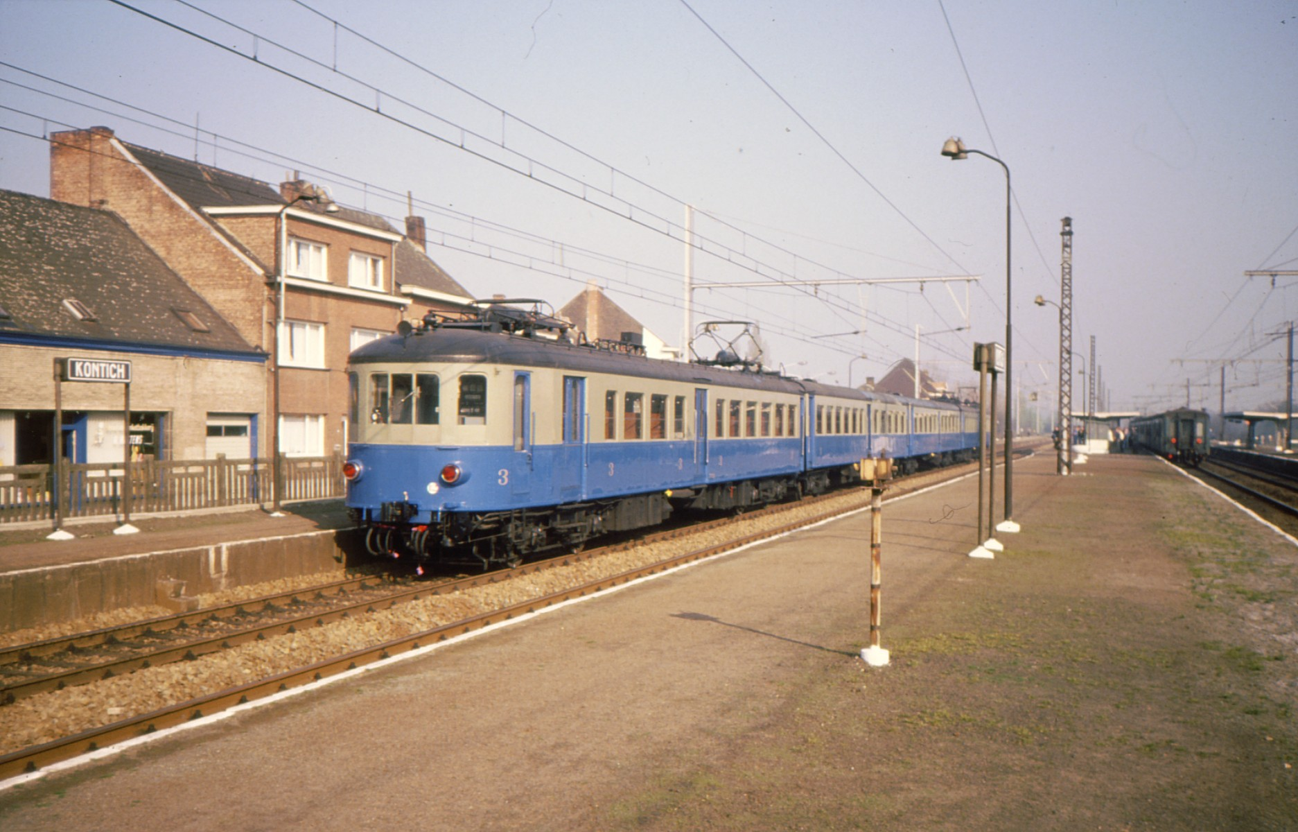 B - NMBS - 3.3. AM1935 - 12 - 1990-03-31 - Kontich (1)